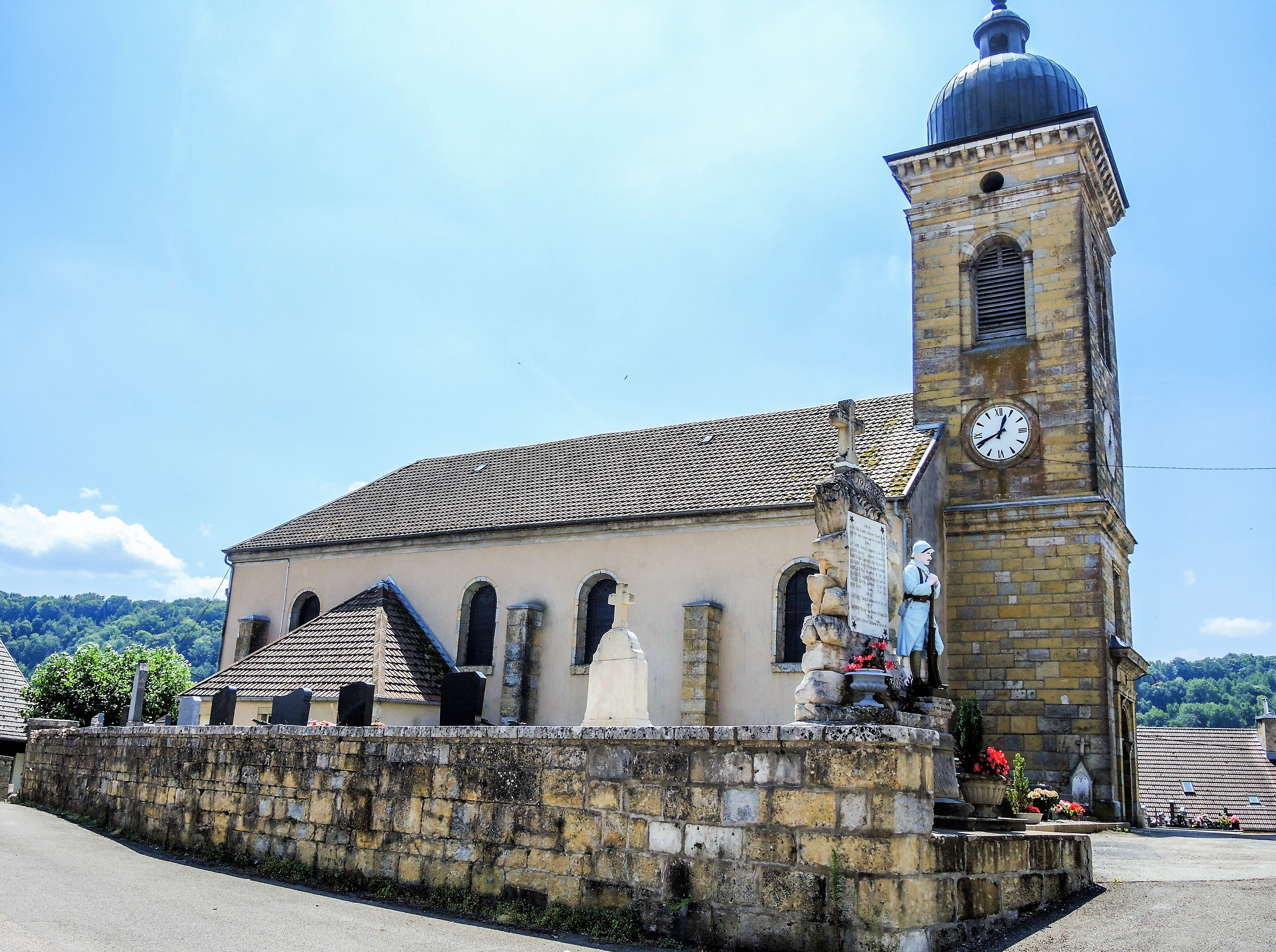 Eglise Saint-Laurent. Eternoz. Doubs